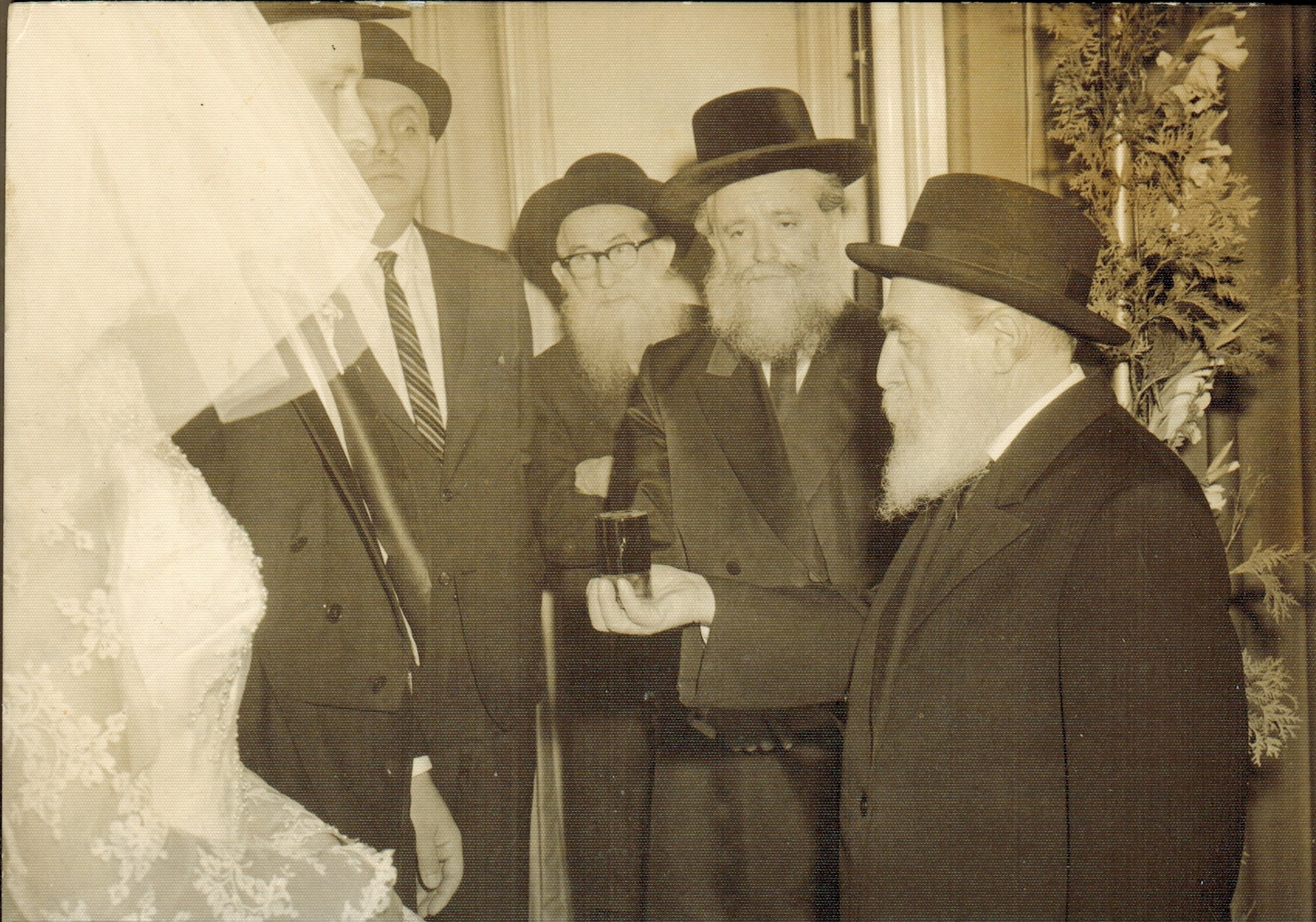 רבי משה פיינשטיין אומר ברכות בחופת בתו של רבי יונה שטנצל שעומד לידו